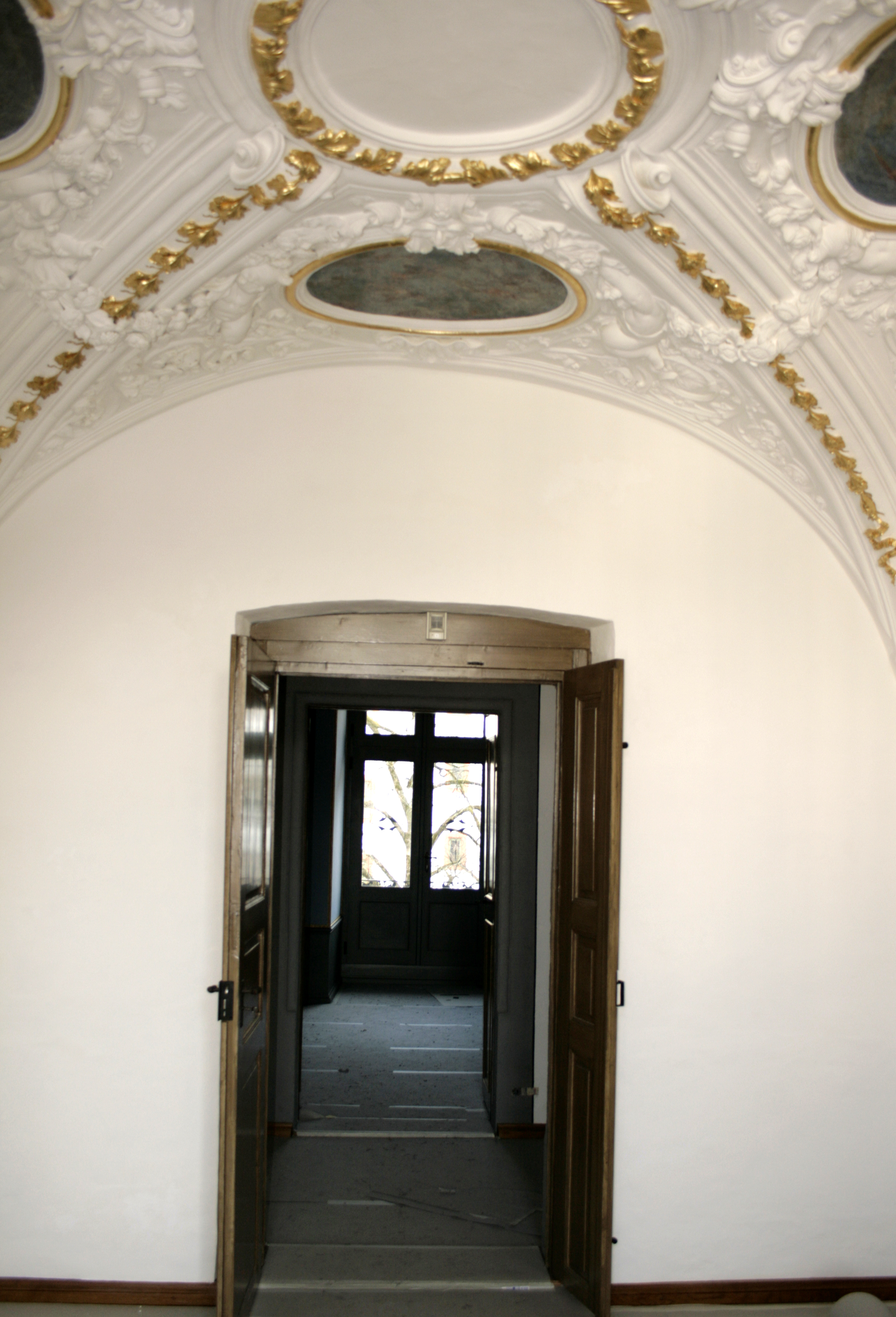 Fürstenwohnung im Schloss Hadamar, Deutschland